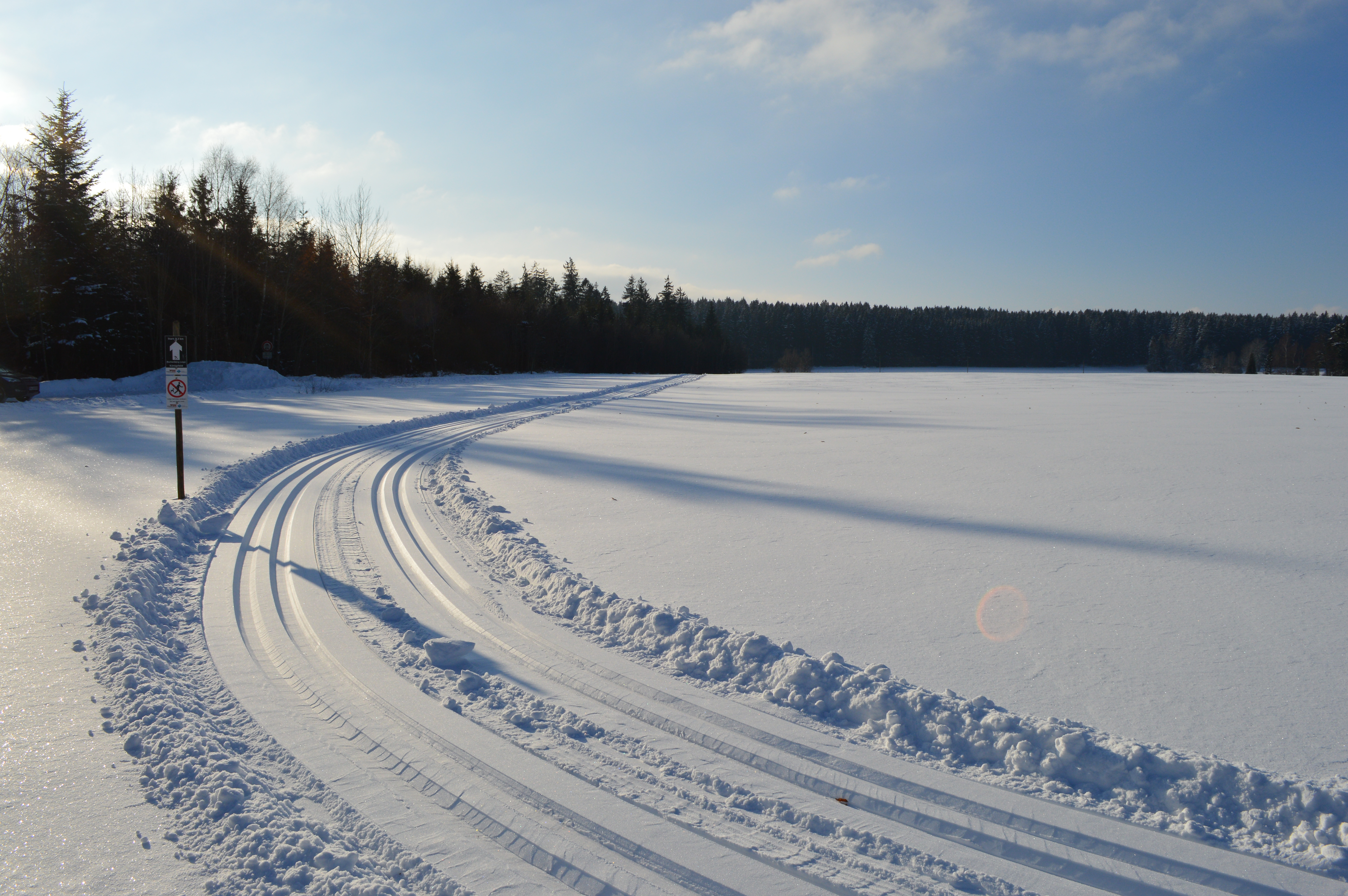 Königsfeld Buchenberg-Loipe 2017